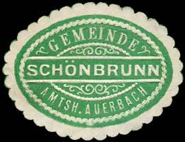 Sealing stamp Title: Gemeinde Schönbrunn - Amtshauptmannschaft Auerbach Description: grün, weiß, geprägt Place: Schönbrunn size: 3x4 cm